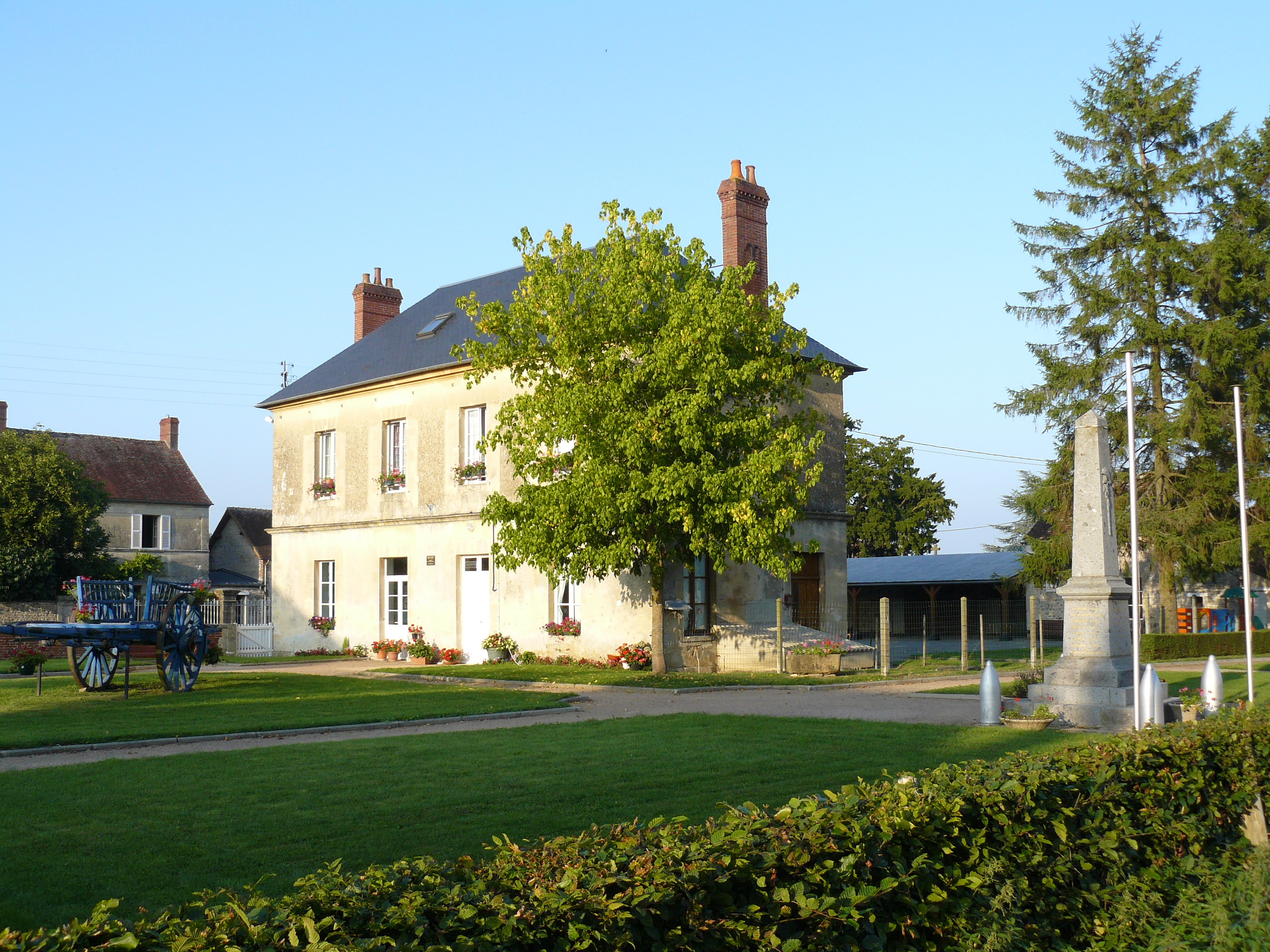 Plan large sur l'école et le monument aux morts